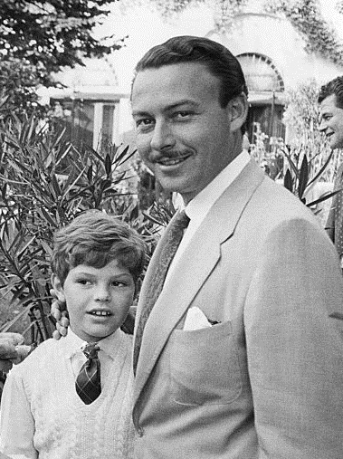 Egon von Furstenberg and Prince Alfonso of Hohenlohe-Langenburg